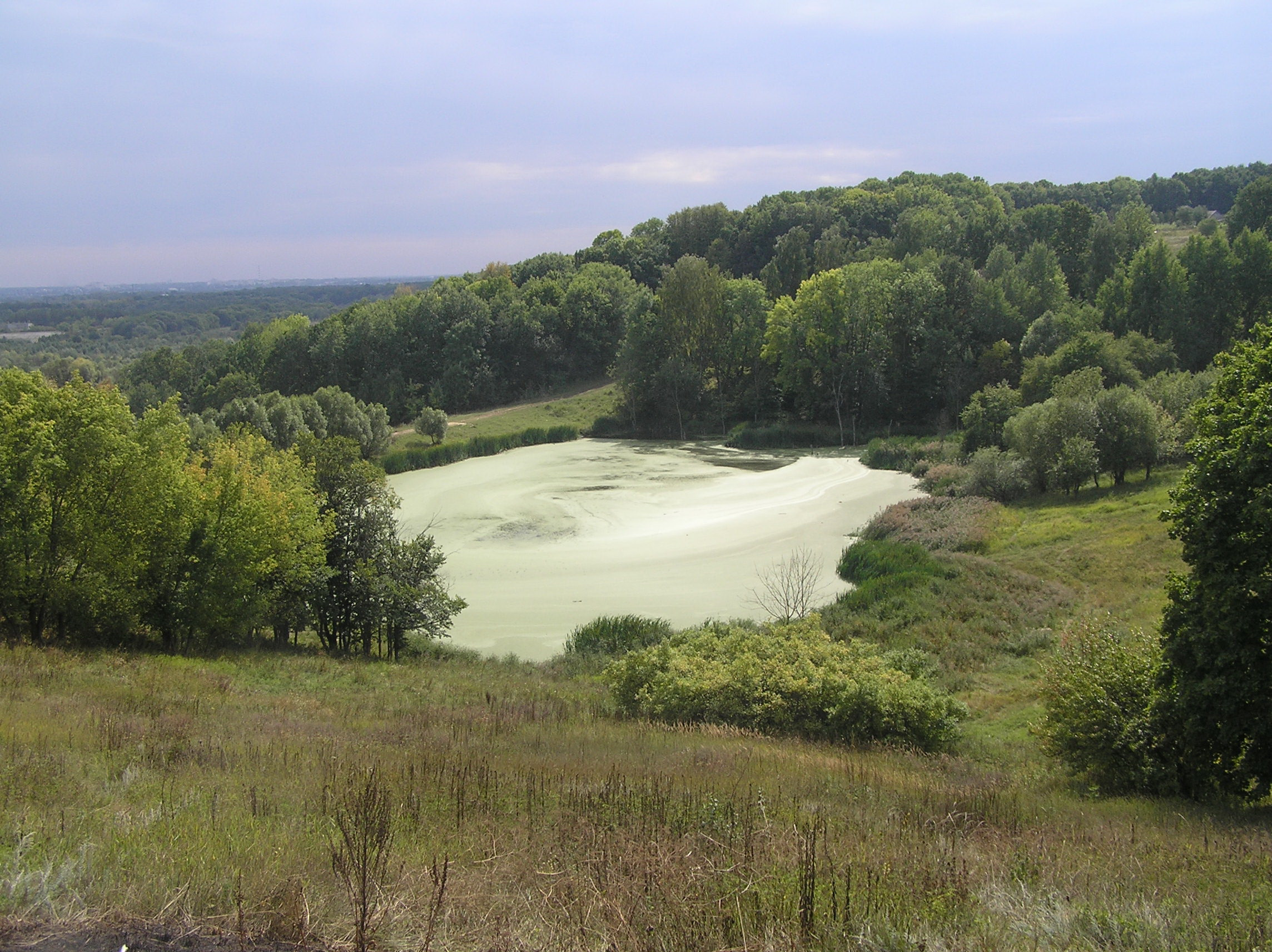 Овражно-балочный биопруд п. Искра.